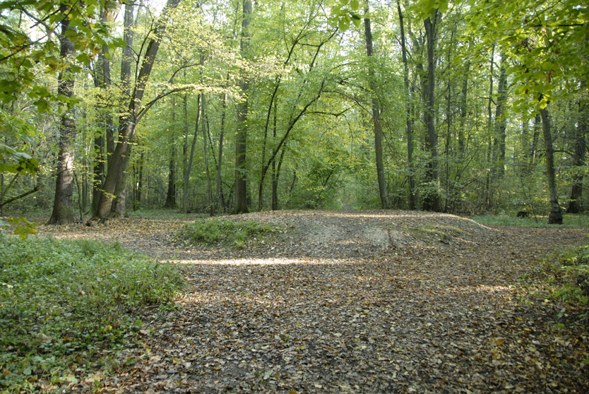 Základy altánu v PP Obora v Uhříněvsi